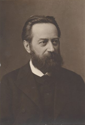 Gustav Teichmüller, saksa filosoof